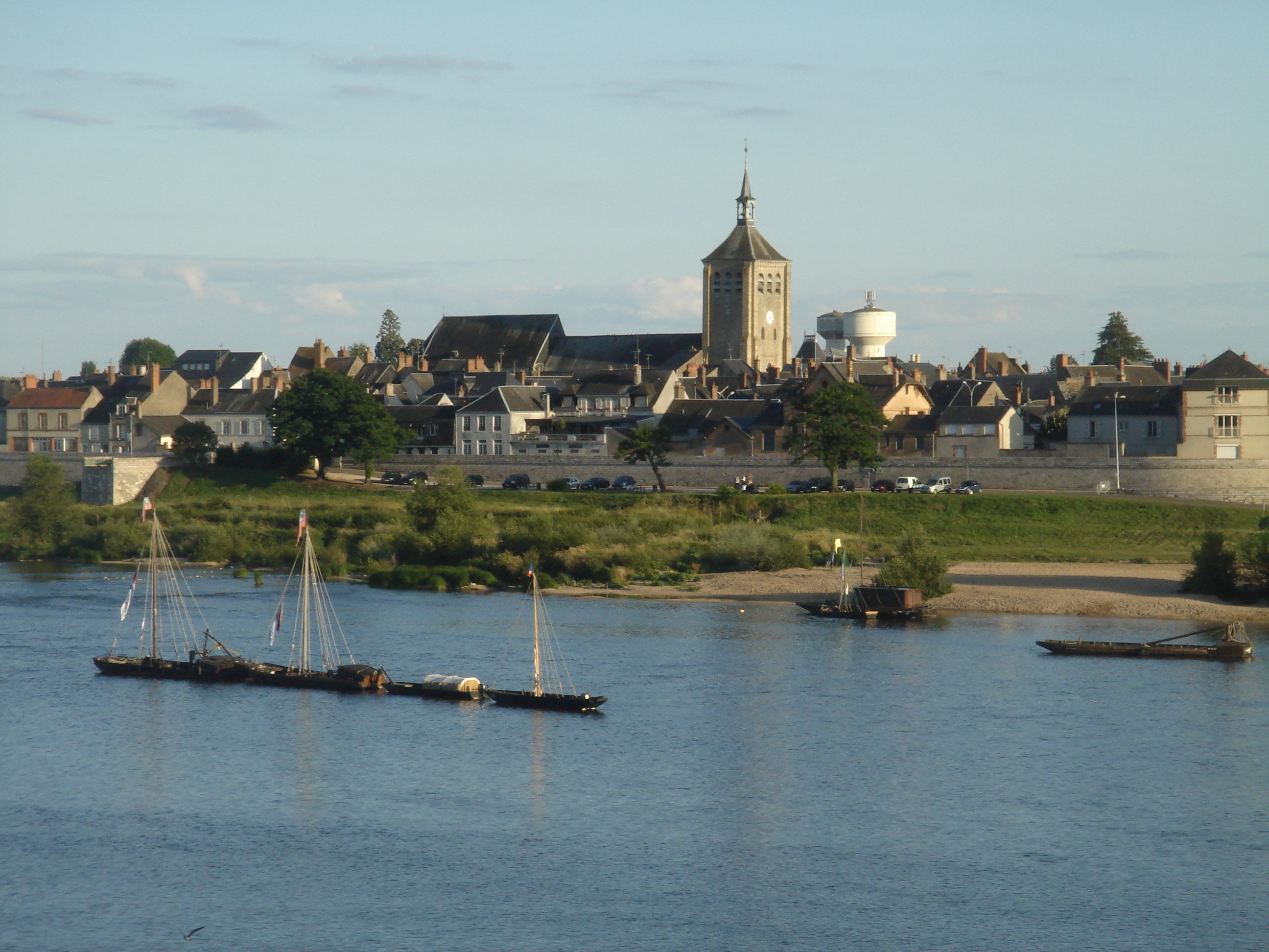 La commune de Jargeau sur les bords de la Loire depuis la commune de Saint-Denis-de-l'Hôtel, Loiret, Centre, France.